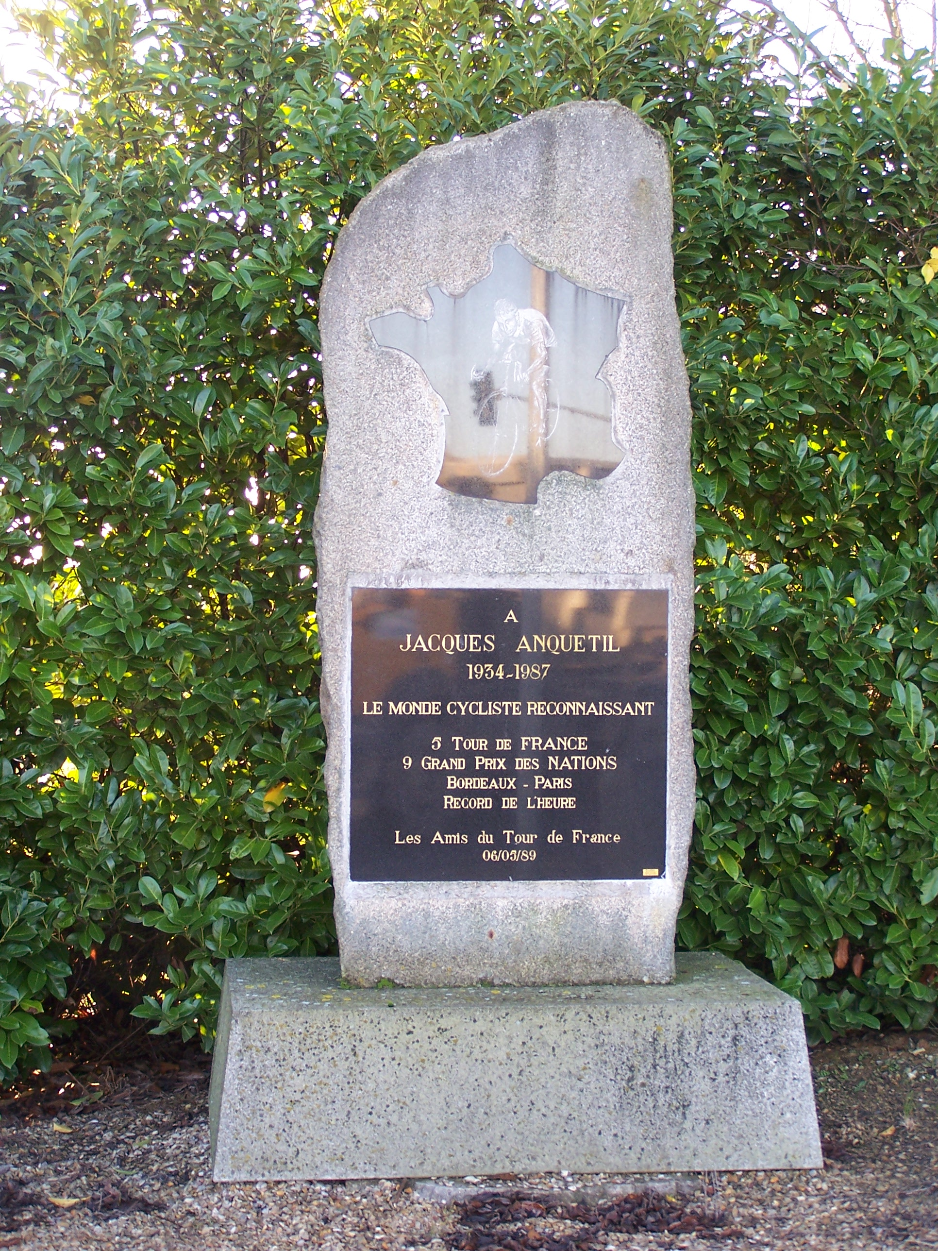 Stèle en hommage à Jacques Anquetil à Châteaufort (Yvelines, France)